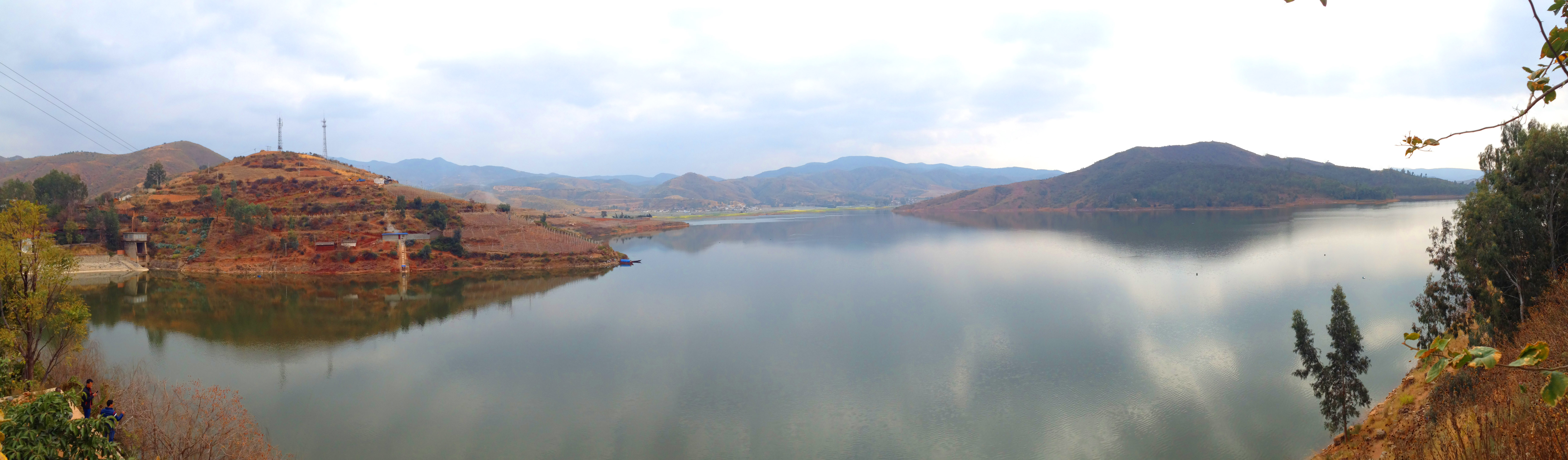 云南省宾川县海稍水库。